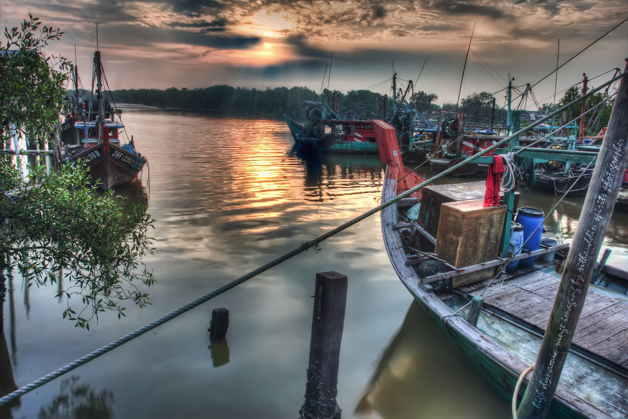 Bagan Pasir @ Kuala Selangor